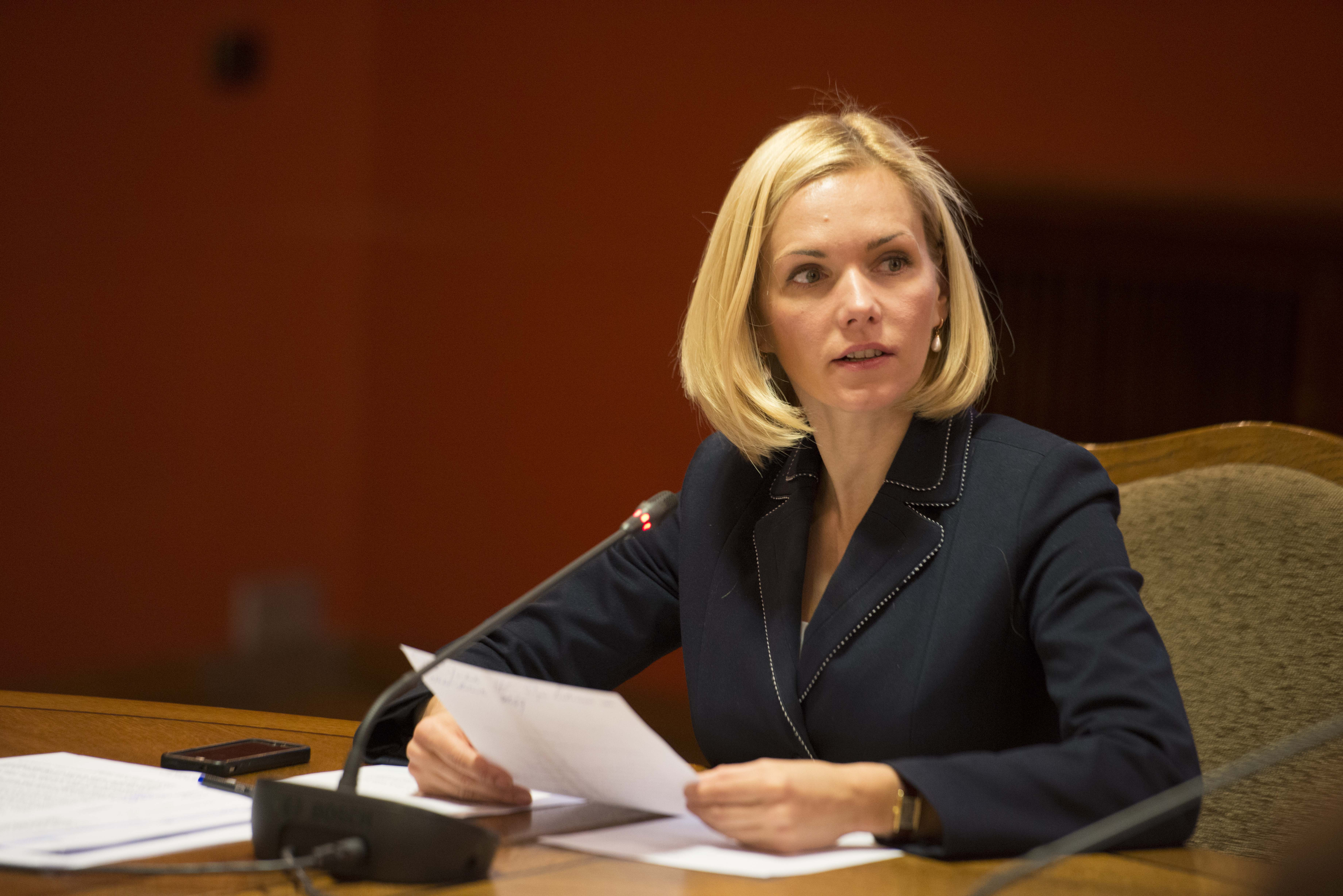 2014.gada 19.marts. Publisko izdevumu un revīzijas komisijas sēde. Foto: Reinis Inkēns, Saeimas Kanceleja Izmantošanas noteikumi: saeima.lv/lv/autortiesibas